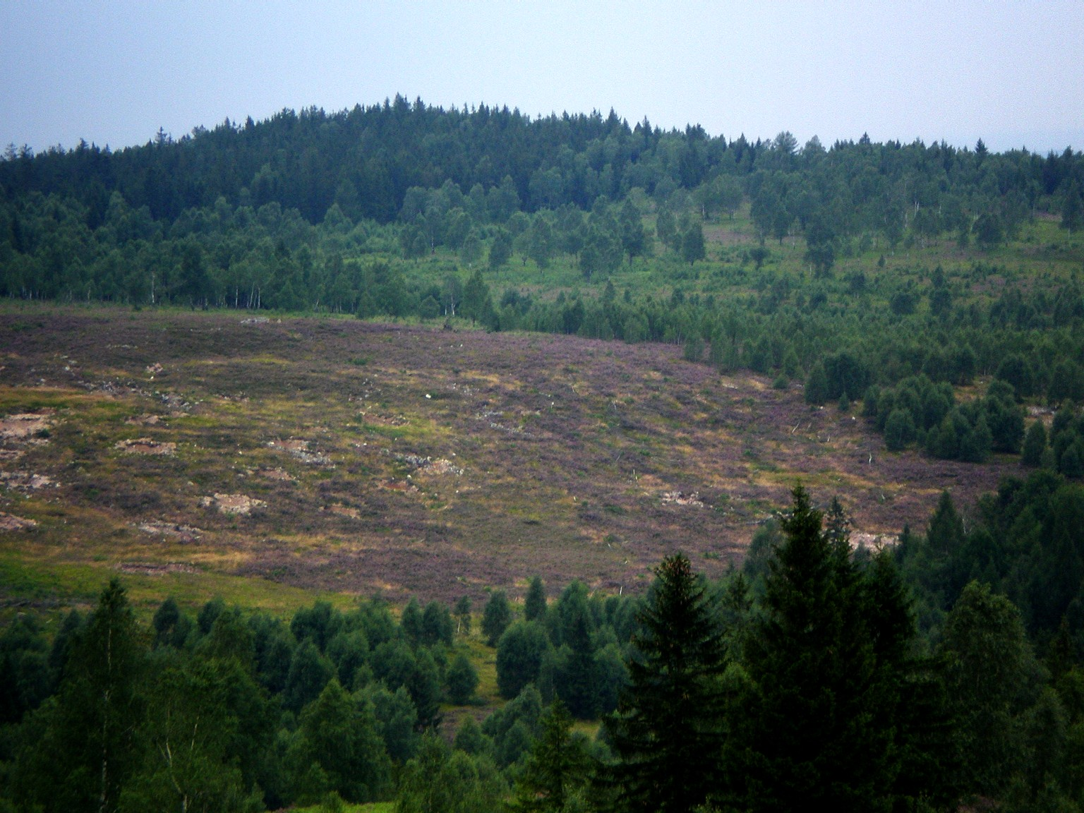 Vrch Jordán (826 m) nad stejnojmennou cílovou plochou